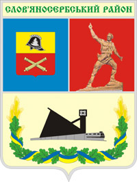 Герб Слов'яносербського району